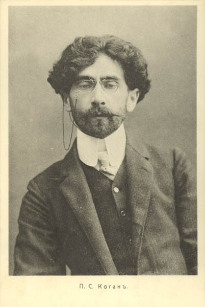 Пётр Семёнович Коган (1872—1932) — российский историк литературы, литературный критик, литературовед, переводчик, профессор МГУ, президент Государственной академии художественных наук, сотрудник Литературной энциклопедии.